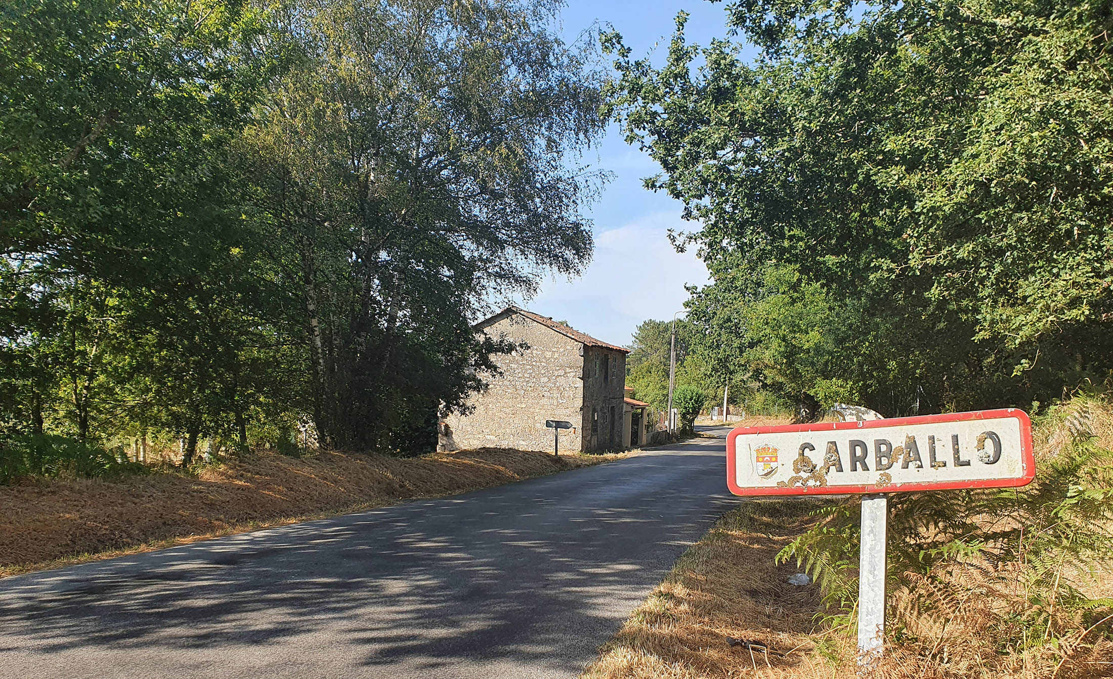 Lugar do Carballo, moi perto da capital do municipio e da parroquia: Antas de Ulla.